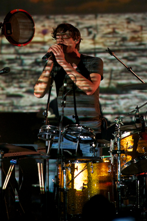 O cantor Gotye.